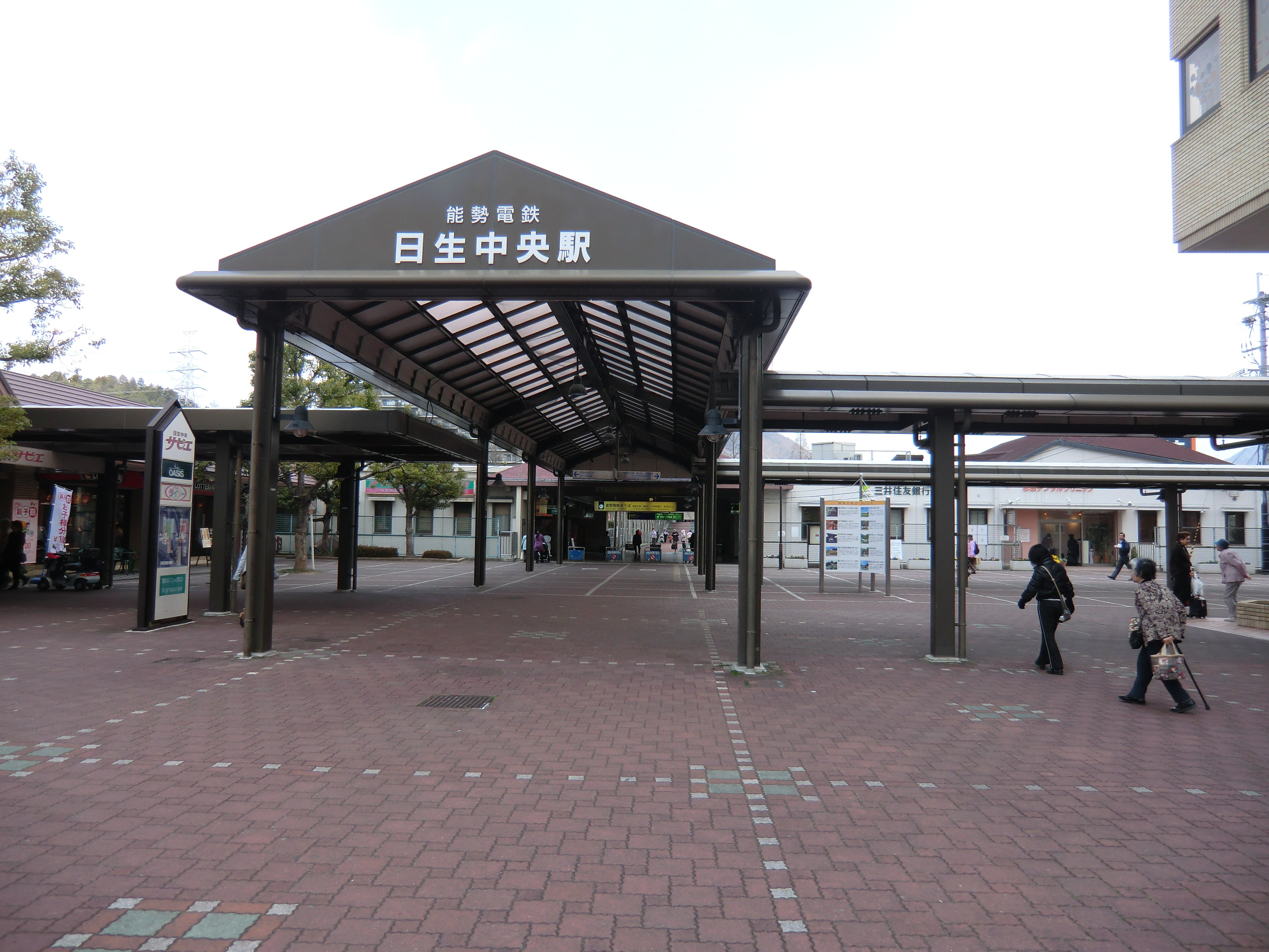 日生中央駅